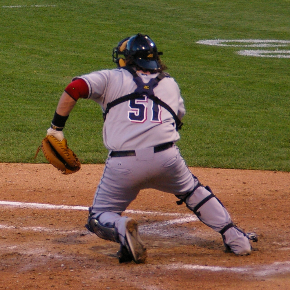 Sal Fasano